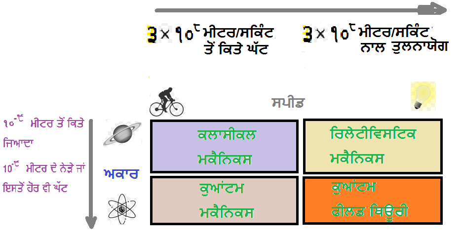 ਪੰਜਾਬੀ: ਕਲਾਸੀਕਲ ਭੌਤਿਕ ਵਿਗਿਆਨ ਆਮਤੌਰ ਤੇ ਰੋਜ਼ਾਨਾ ਪ੍ਰਸਥਿਤੀਆਂ: ਪ੍ਰਕਾਸ਼ ਦੀ ਸਪੀਡ ਤੋਂ ਕਿਤੇ ਜਿਆਦਾ ਘੱਟ ਸਪੀਡਾਂ, ਅਤੇ ਐਟਮਾਂ ਦੇ ਅਕਾਰਾਂ ਤੋਂ ਕਿਤੇ ਜਿਆਦਾ ਵਿਸ਼ਾਲ ਅਕਾਰਾਂ ਨਾਲ ਵਾਸਤਾ ਰੱਖਦੀ ਹੈ। ਅਜੋਕੀ ਭੌਤਿਕ ਵਿਗਿਆਨ ਆਮਤੌਰ ਤੇ ਉੱਚ ਵਿਲੌਸਿਟੀਆਂ ਅਤੇ ਸੂਖਮ ਦੂਰੀਆਂ ਨਾਲ ਵਾਸਤਾ ਰੱਖਦੀ ਹੈ